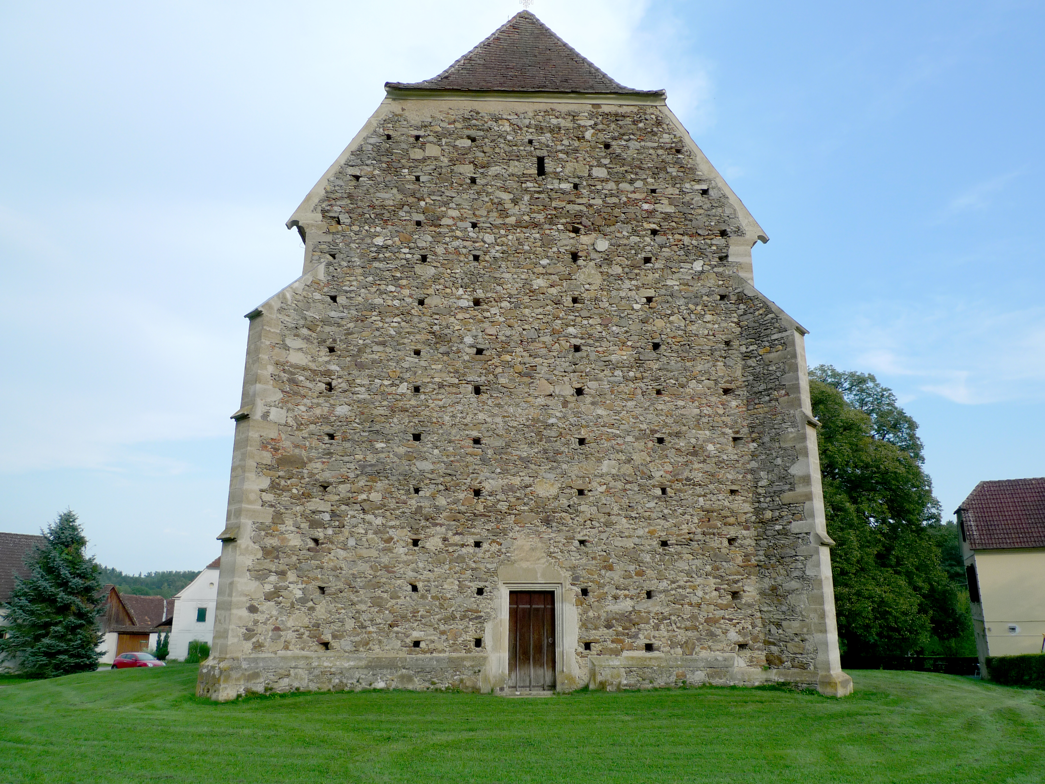 Kath. Filialkirche hl. Stephanus, Hofkirchen